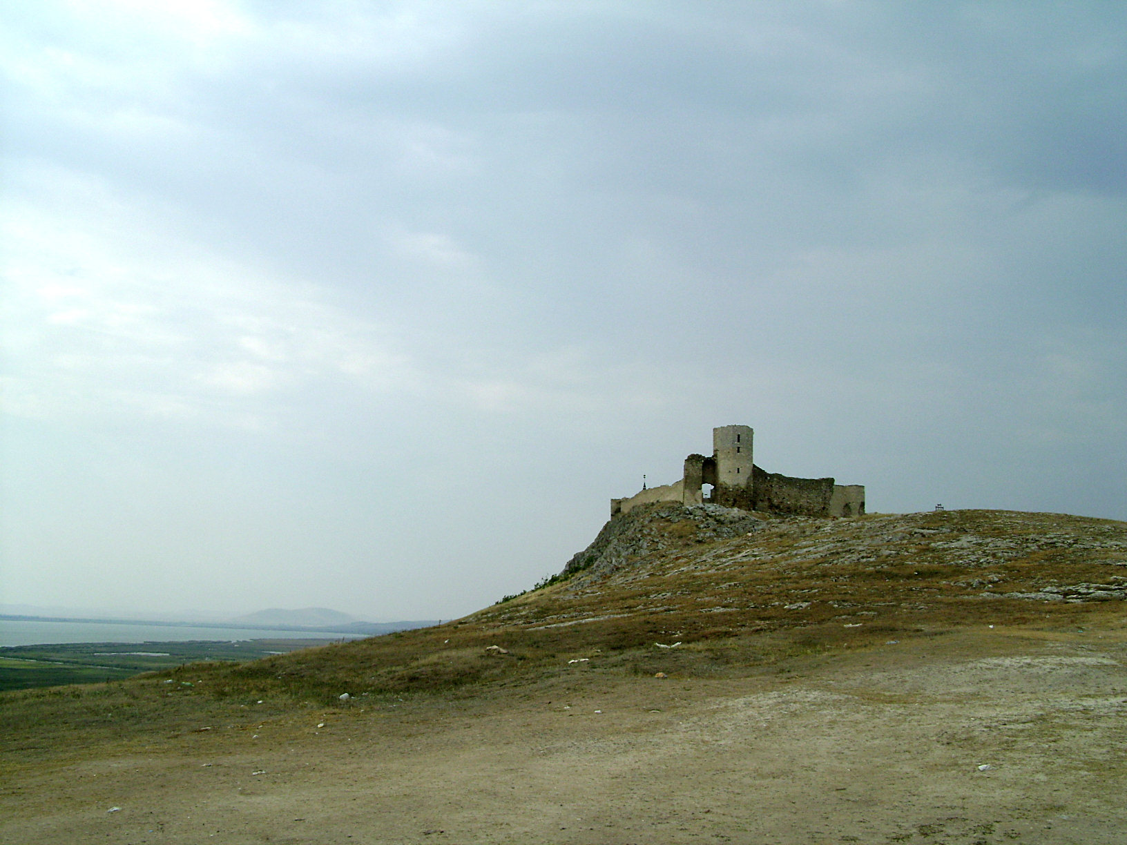 Cetatea Enisala cu un colt de peisaj din zona, Comuna Enisala, Judetul Tulcea. Toamna 2009